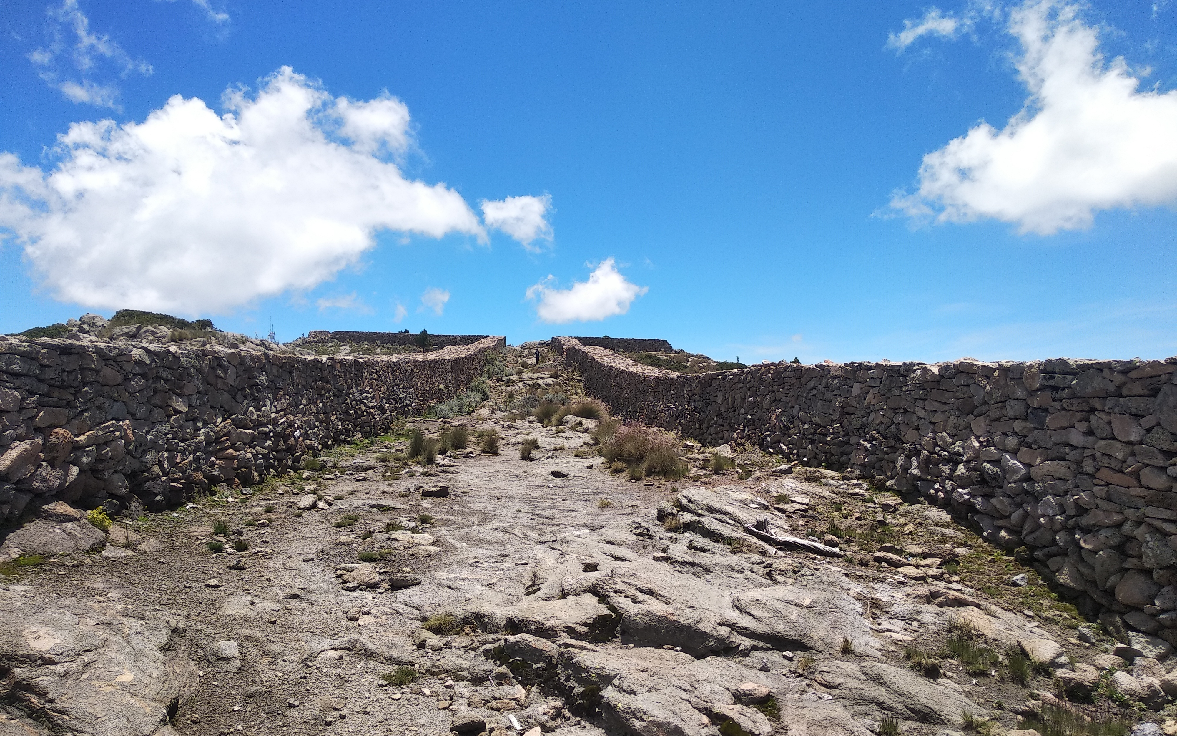 Vista desde la entrada a la calzada que lleva a la cima del monte Tláloc. Esta calzada se compone de lajas sobrepuestas y se construyó entre los años 350 y 900.